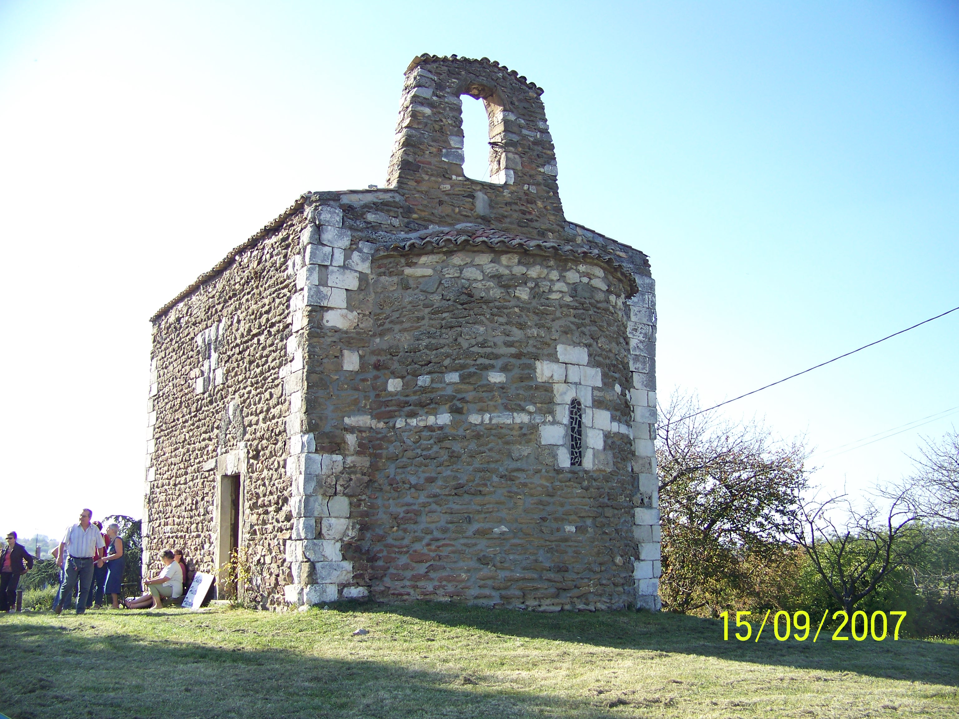 Chuzelles (Isère, France) - Chapelle Saint-Maxime Façade est. La cloche est manquante en 2007 pour cause de réparation.